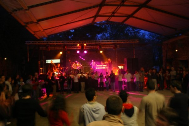 Fest-noz au Fort du Dellec à Plouzane le 25 avril 2009.